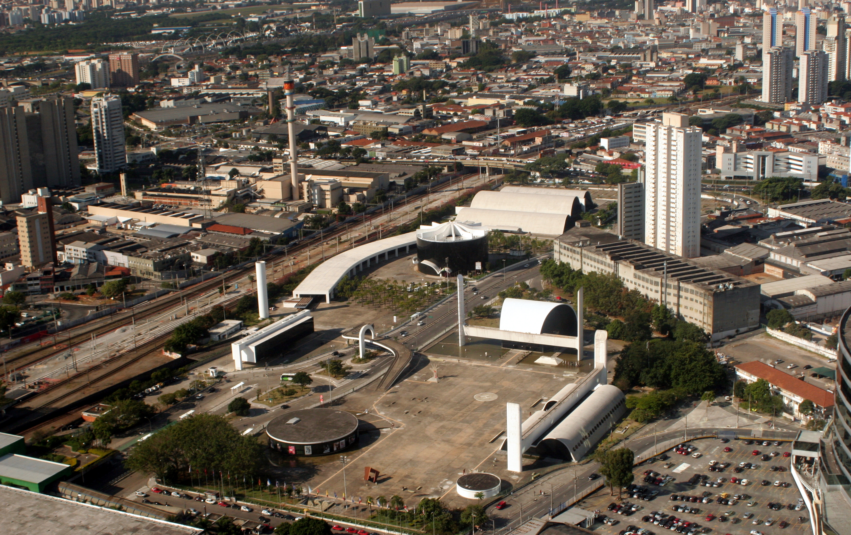 Memorial da América Latina em São Paulo, Brasil